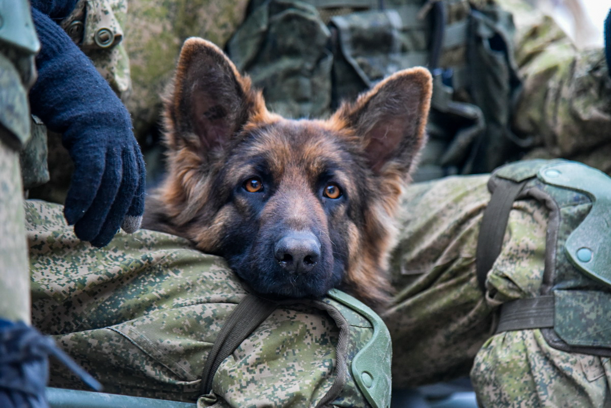 Работа сапёров Международного противоминного центра Министерства обороны России в Алеппо (Сирия)